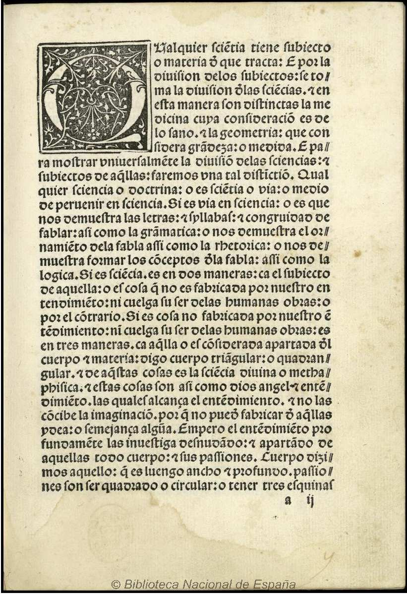 Ética a Nicómaco. Título: Ethica ad Nicomachum [traducida por el Bachiller Alfonso de la Torre] Autor: Aristóteles ; Torre, Alfonso de la (m. 1460) Fecha: 1493 Datos de edición: Impressas en Sevilla por Menardo Ungut Aleman [et] La[n]çalao Polono co[n]pañeros (Ungut, Meinardo) (Polono, Estanislao (fl. 1491-1514).)